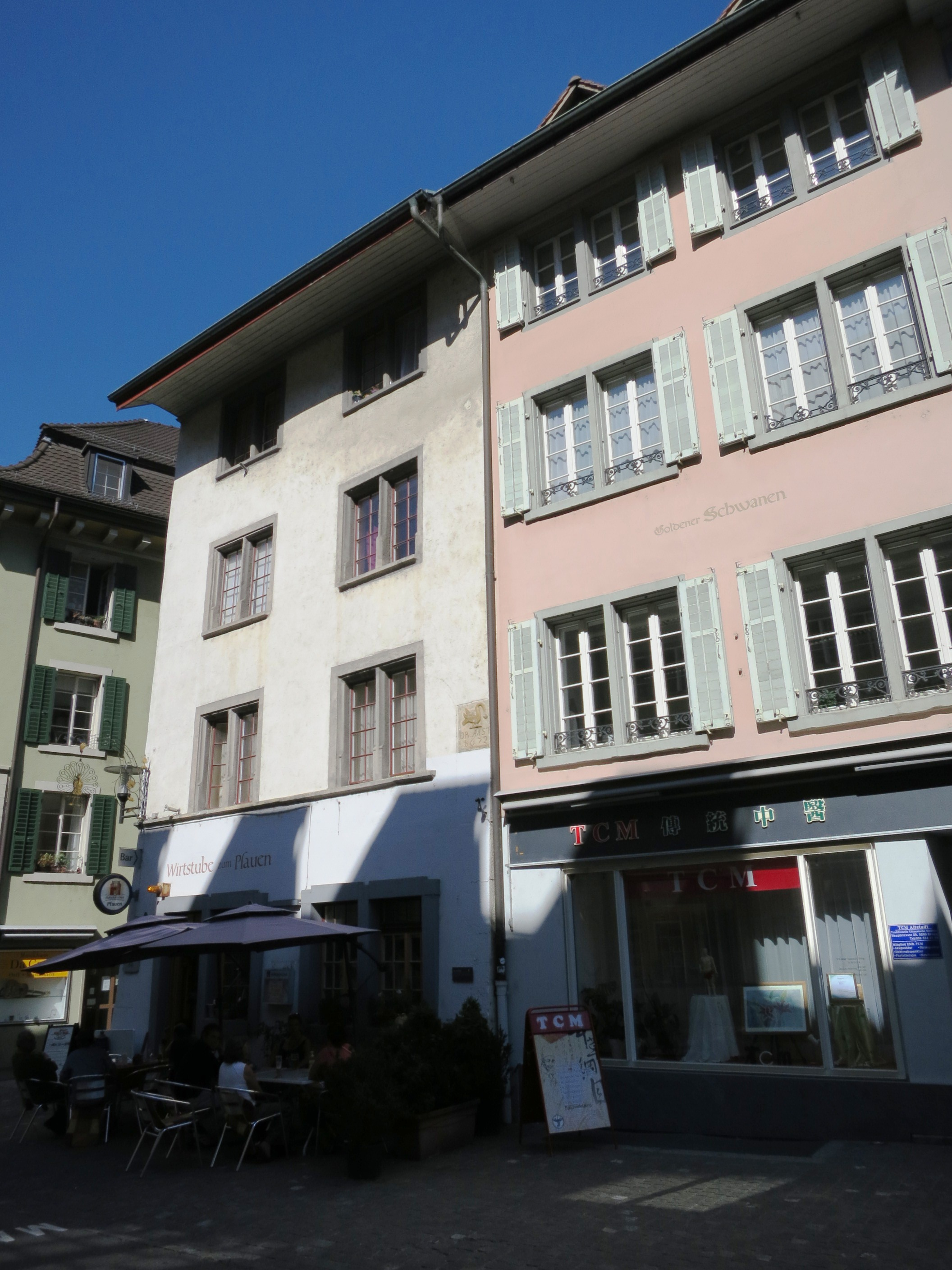 Haus zum Pfauen, Brugg AG, Schweiz